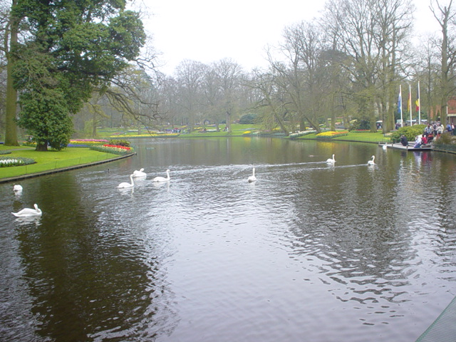 A man-made lake in Keukenhof, Netherlands